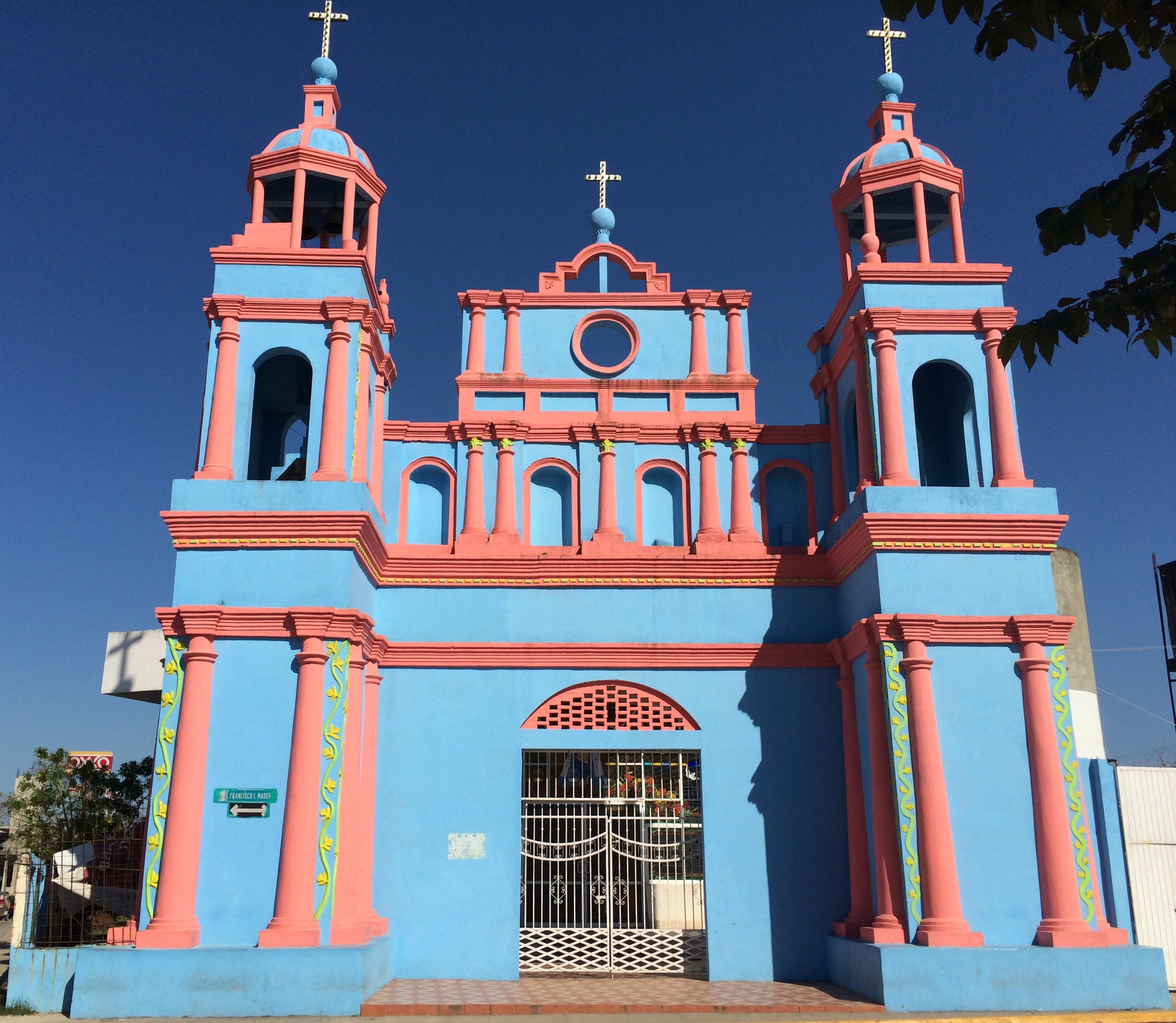 Vista des Torres de la Parroquia de la Virgen de la Natividad de Frente